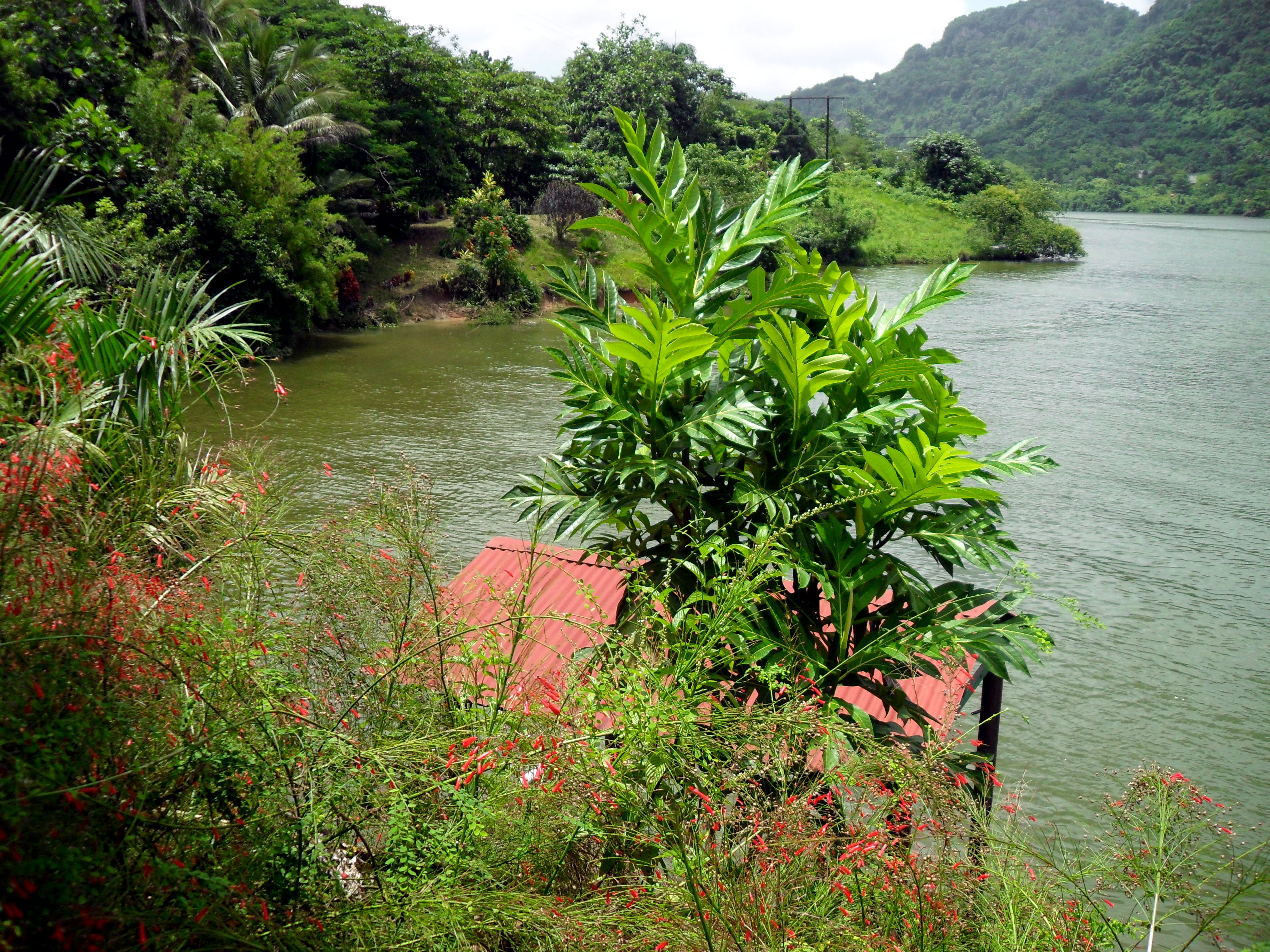 Embalse Dos Bocas de Utuado